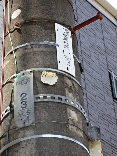 右上のNTTの新プレートは「楽天地」、左下の電電公社の旧プレートは「無門庵」？逆なら解るんだけど、なんでかしら？